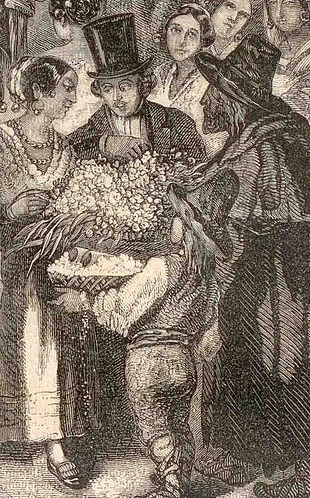 Détail d'une illustration du Carnaval de Rome